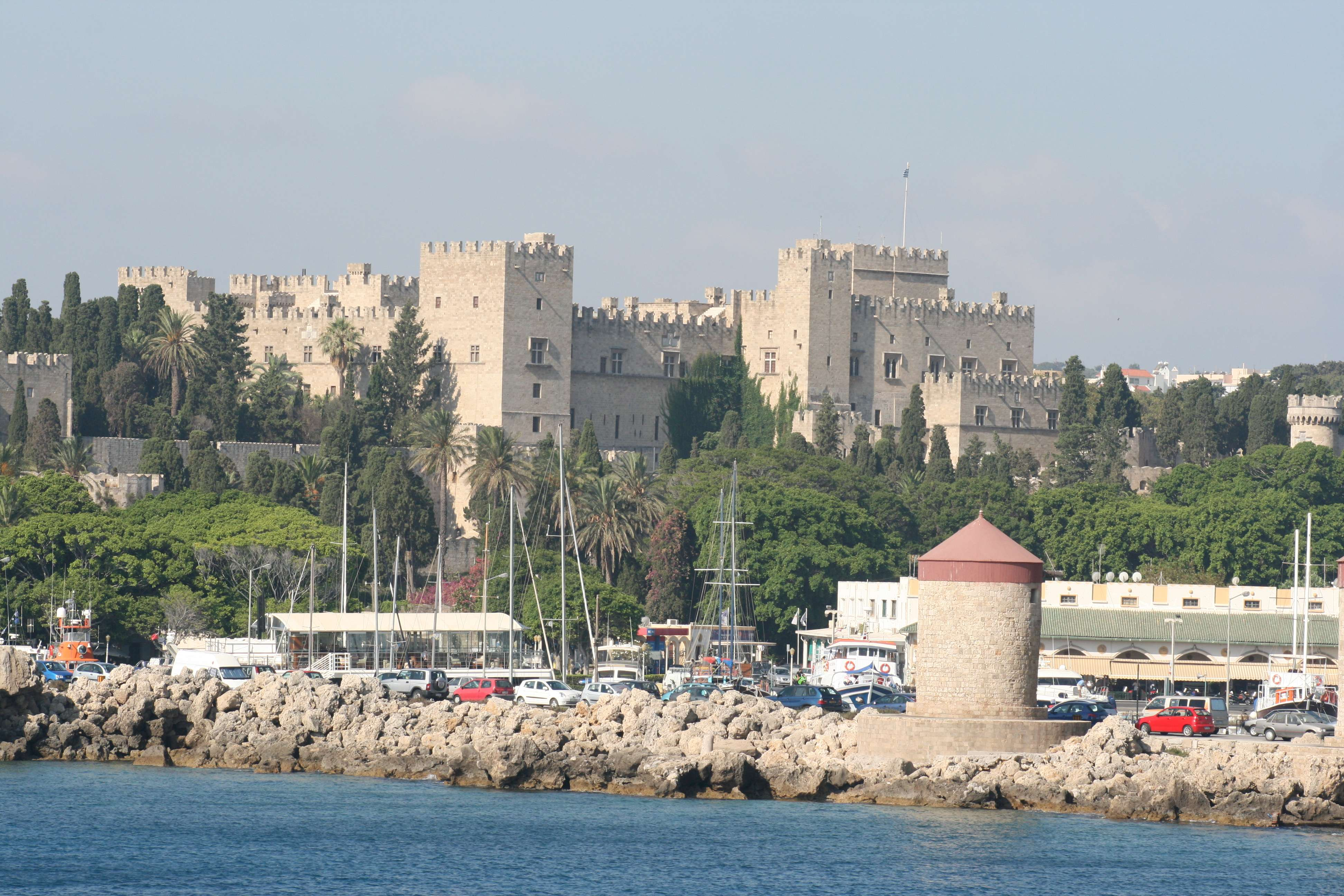 Rodi: Palazzo del Grande Maestro visto dal mare